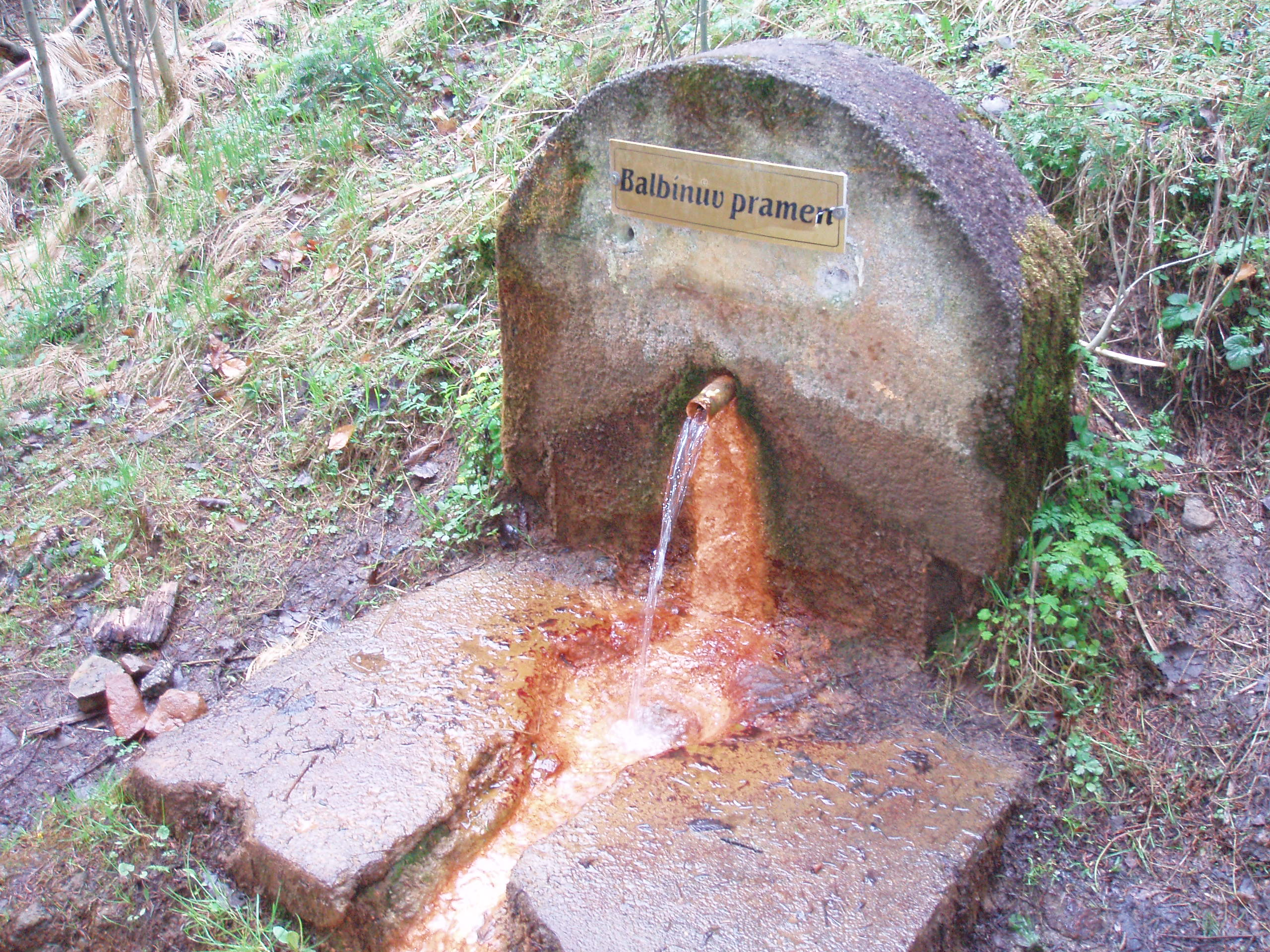 Balbínův pramen v rašeliništi